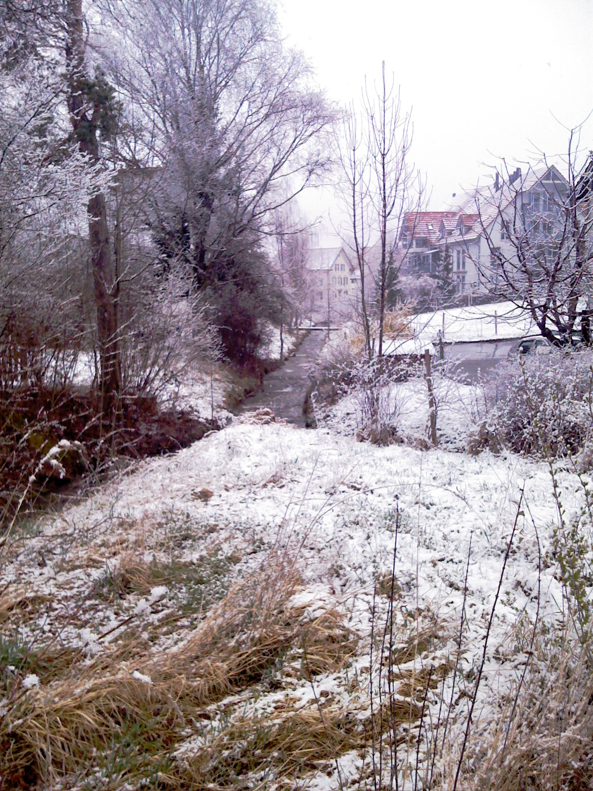 Eulach in Ellg, Canton Zurich, Switzerland - Eulach en Elgg, Kantono Zuriko, Svislando